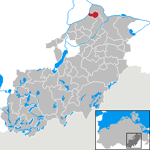 Beseritz in Mecklenburg-Vorpommern, Landkreis Mecklenburg-Strelitz